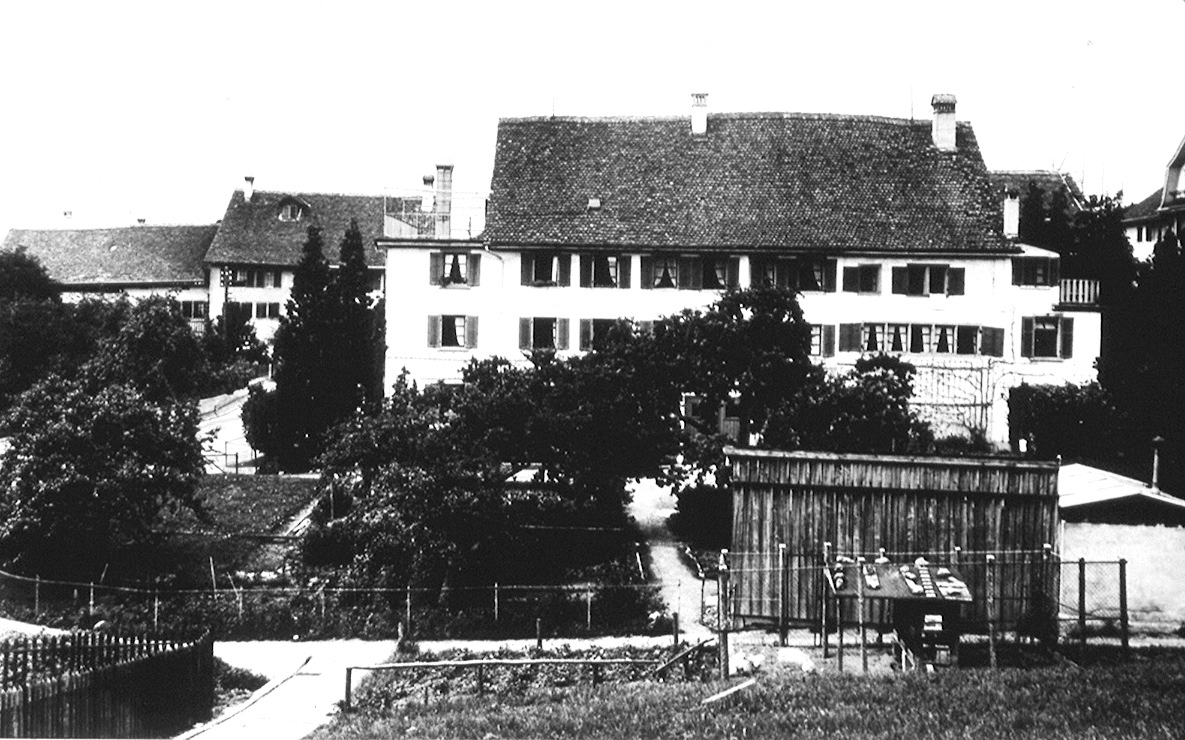 Haus Im Felsengrund Ansich von Süden, um 1910